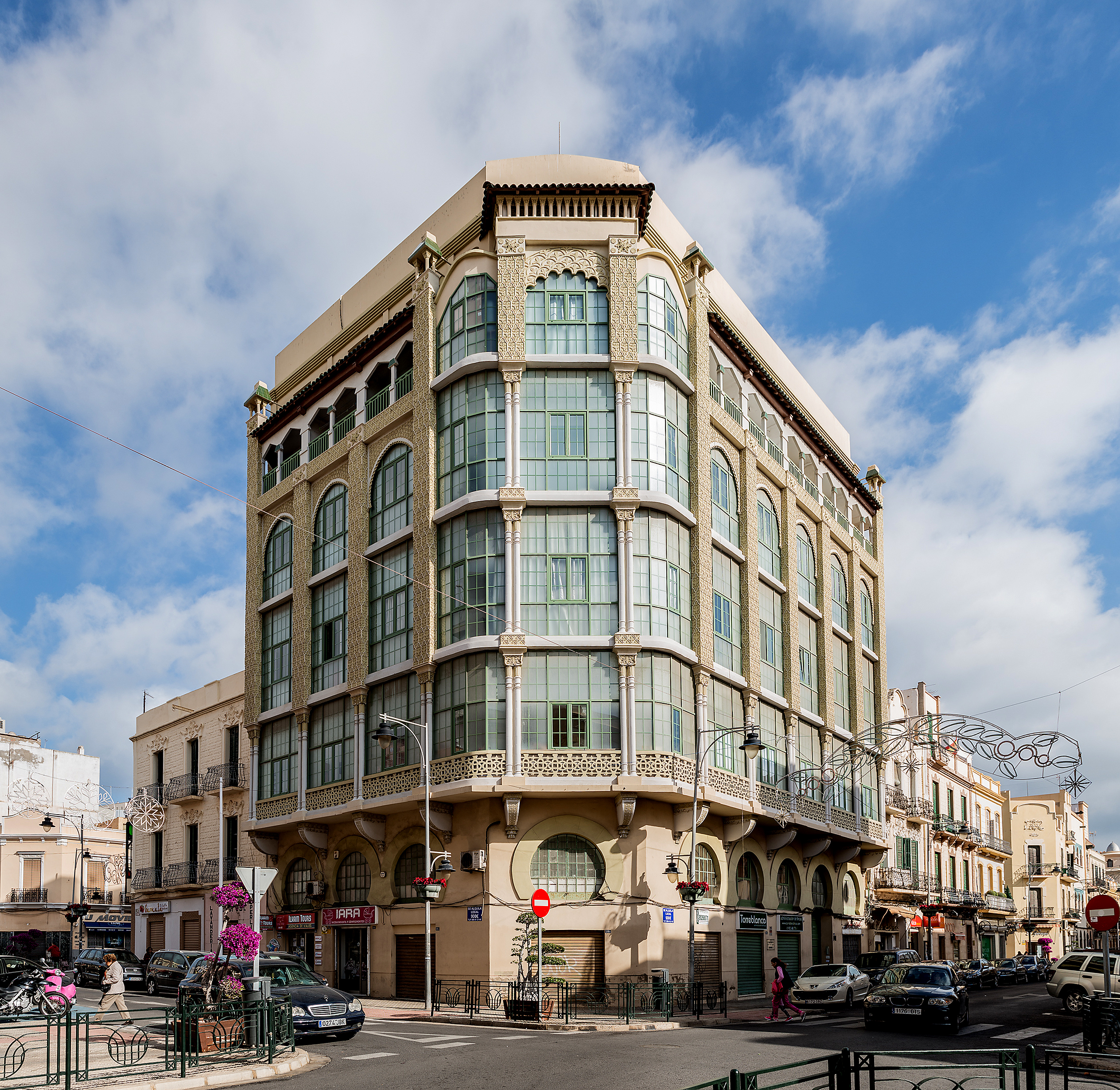 La Casa de los Cristales es un edificio neoárabe situado en la calle General Prim de Melilla que forma parte del Conjunto Histórico Artístico de la Ciudad de Melilla, un Bien de Interés Cultural